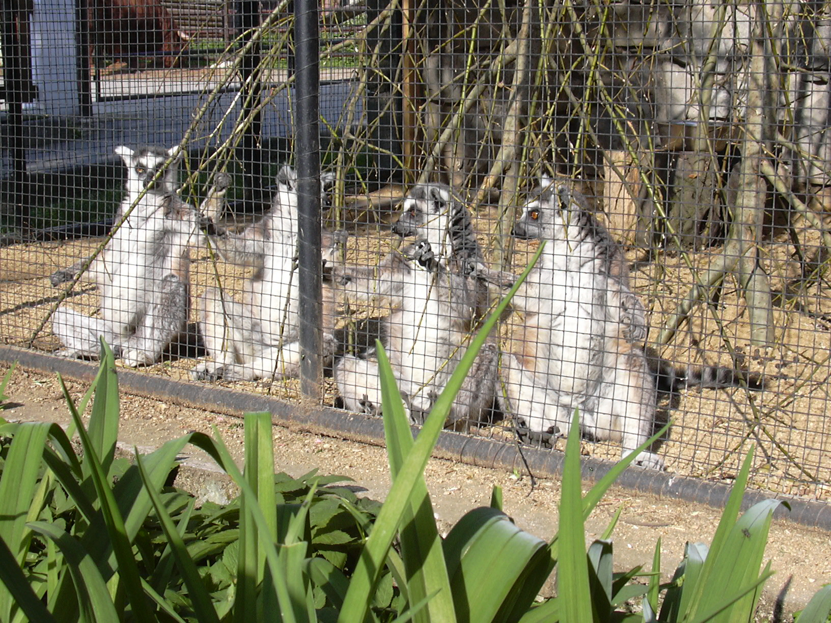 Lemuři Kata z Vyškovského Zooparku (czech republic)